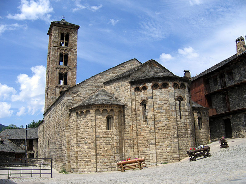 Església de Santa Maria de Taüll (Alta Ribagorça, Catalunya).